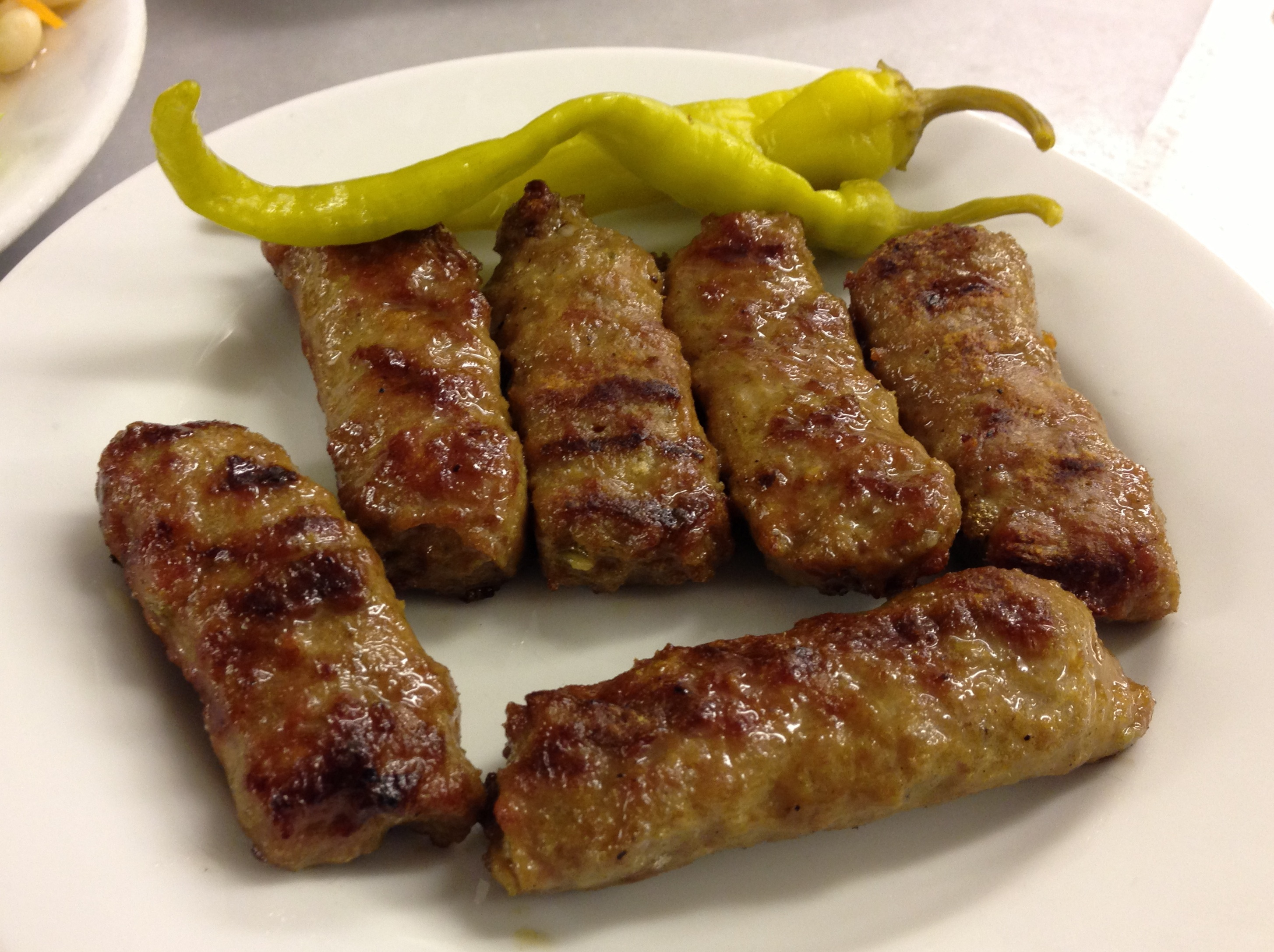 Biber turşusu ile birlikte servis edilmiş köfteler.